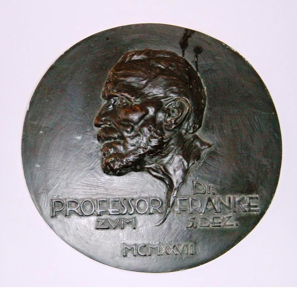 Gedenktafel des Prof. Dr. Hermann Franke, bekannter Publizist der Geologie und Mineralogie, Mineraliensammlung im Naturhistorischen Museum in Schleusingen dauerhaft ausgestellt.